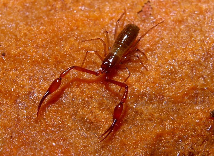 Pseudoscorpion de la Montagne noire, vue dorsale